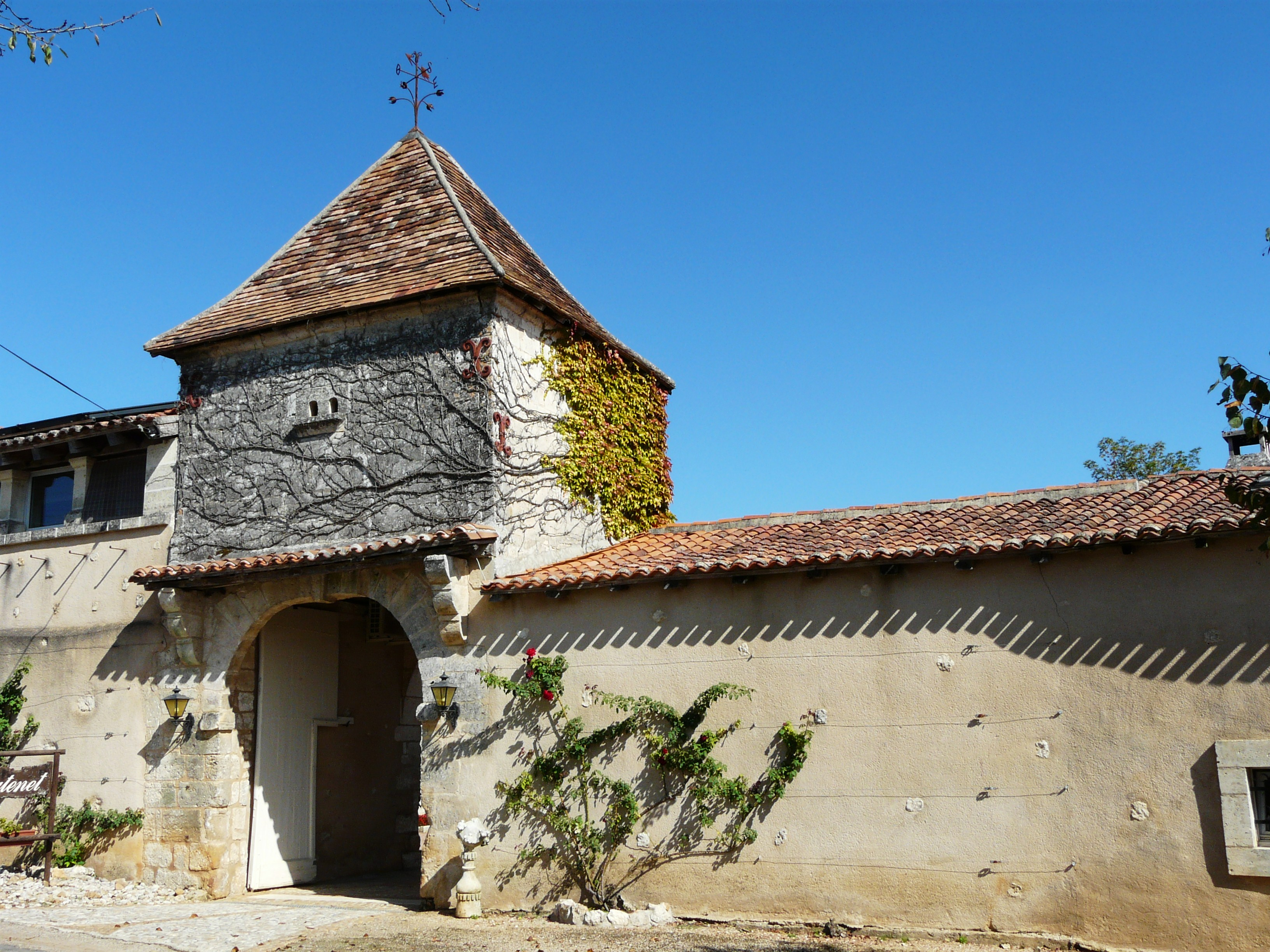 Le pigeonnier-porche du manoir du Chatenet, Brantôme, Dordogne, France